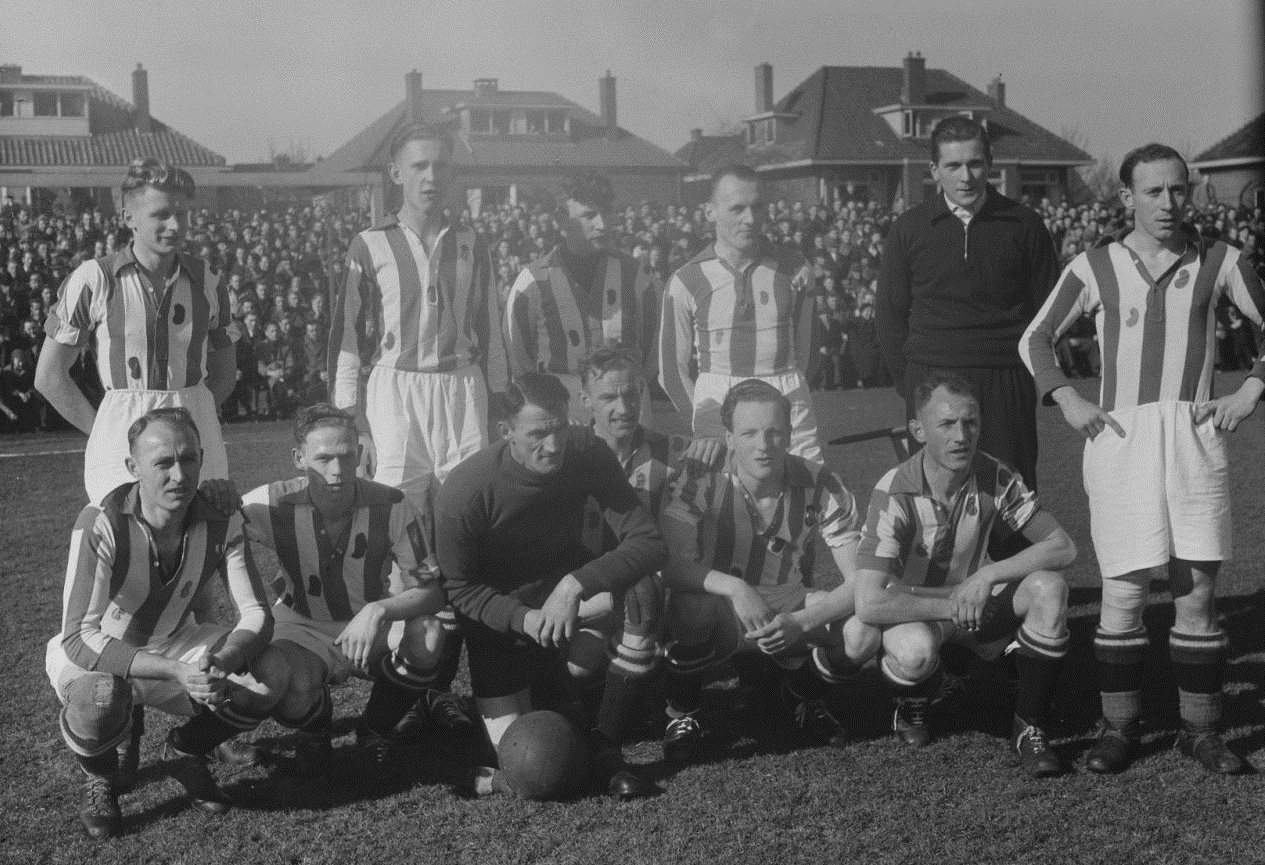 SC Heerenveen elftal.